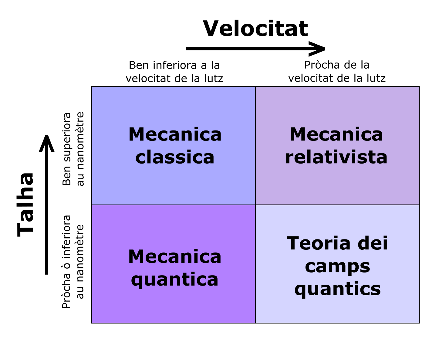 Domenis d'aplicacion dei diferentei teorias fisicas.